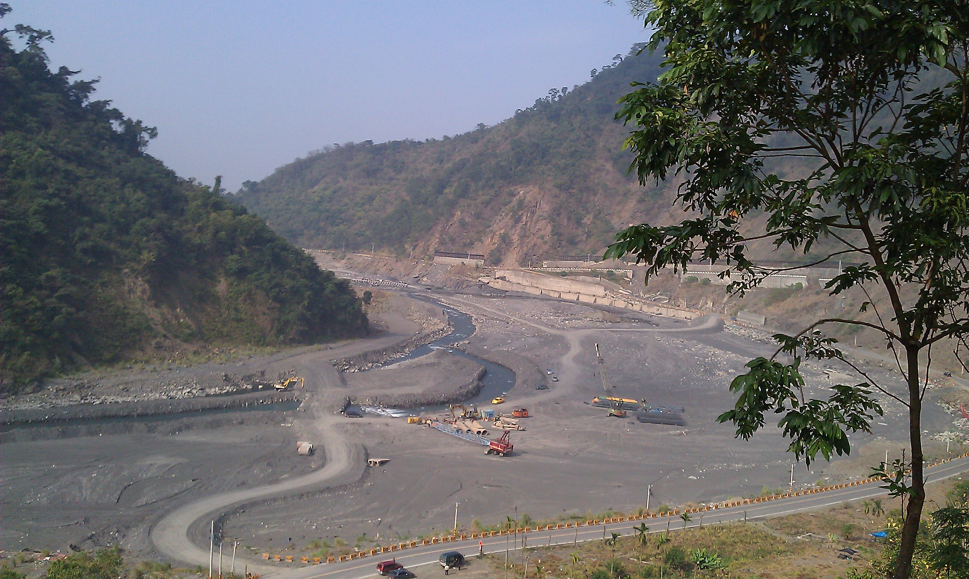 新橋的位置